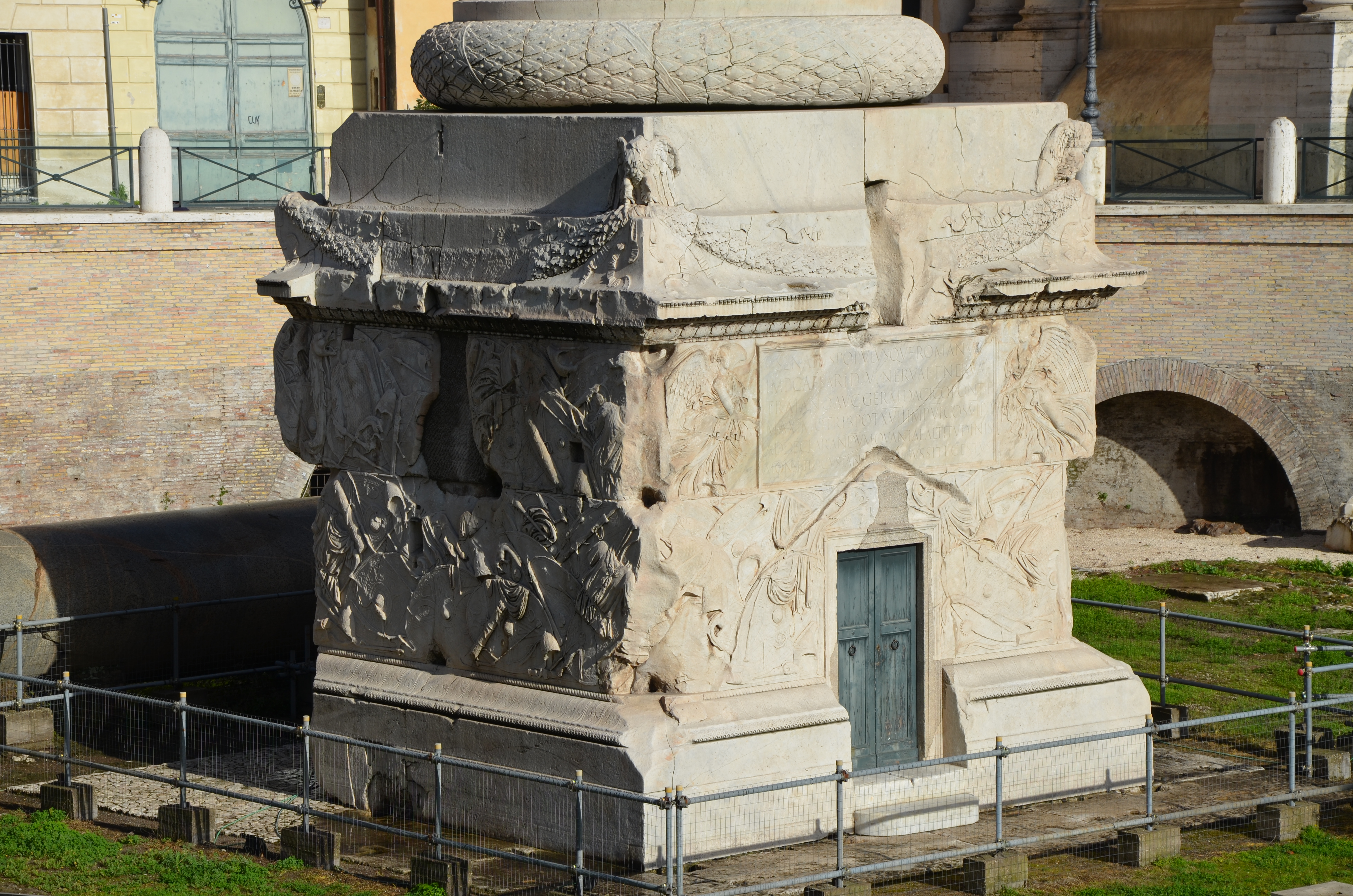 Trajan's Column, Rome